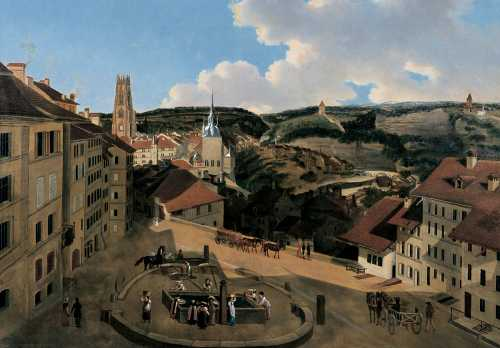 La place du Petit-Paradis à Fribourg, 1819, huile sur toile. Musée d’art et d’histoire Fribourg.